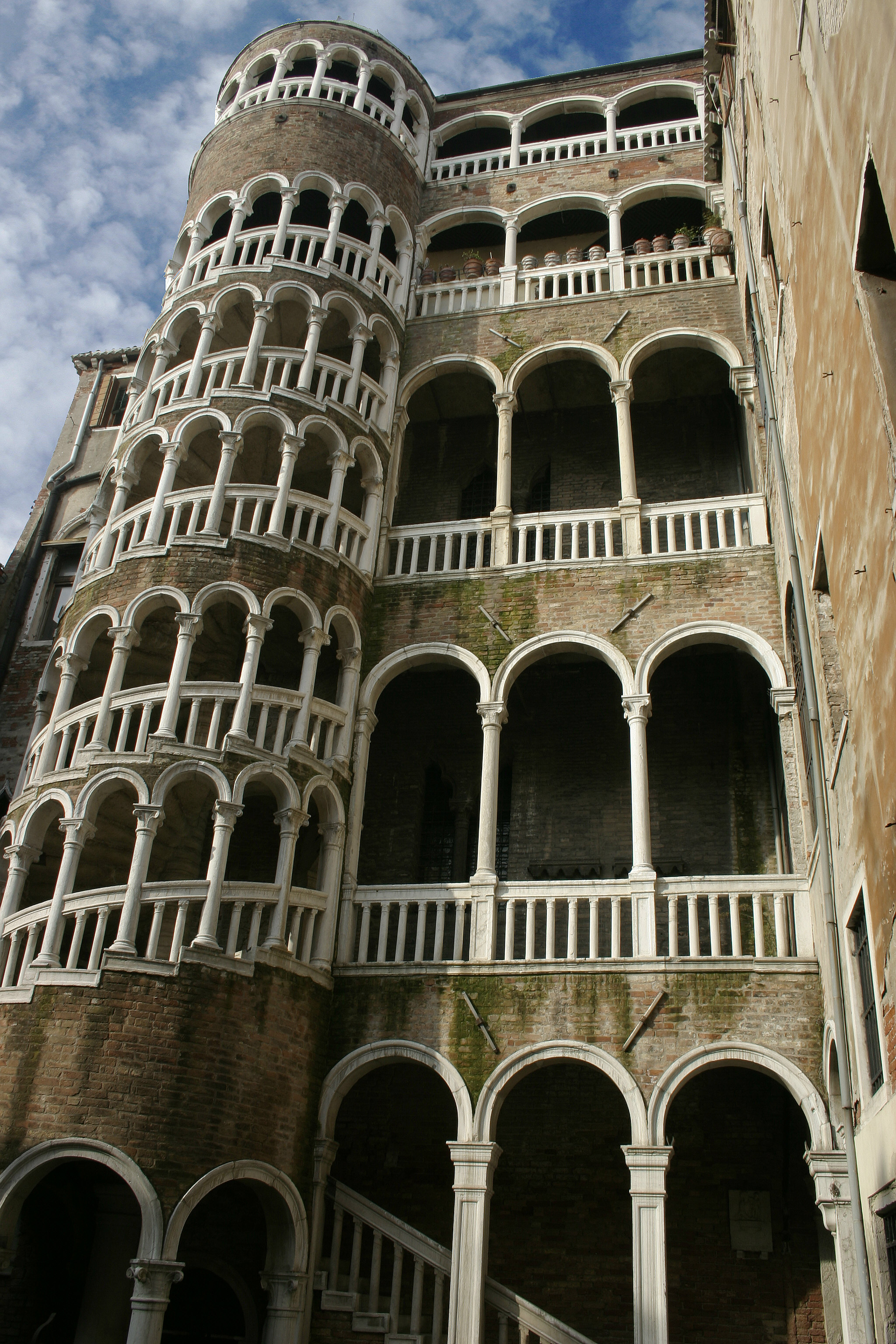 Venezia – Palazzo Contarini del Bovolo